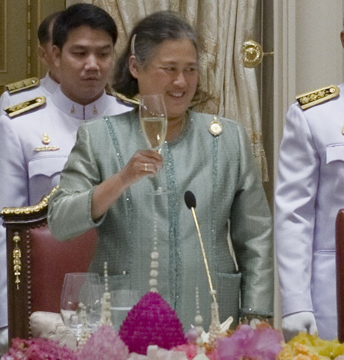 นายกรัฐมนตรี และภริยา เข้าเฝ้าทูลละอองพระบาท สมเด็จพระเทพรัตนราชสุดาฯ สยามบรมราชกุมารี ในงานพระราชทานเลี้ยงอาหารค่ำแก่ผู้ได้รับพระราชทานรางวัลสมเด็จเจ้าฟ้ามหิดล ประจำปี 2553 และกล่าวเชิญชวนดื่มถวายพระพร ณ พระที่นั่งบรมราชสถิตยมโหฬาร ในพระบรมมหาราชวัง วันพุธ ที่ 26 มกราคม พ.ศ.2554 (Photographer attached to the Prime Minister of the Kingdom of Thailand : Peerapat Wimolrungkarat / พีรพัฒน์ วิมลรังครัตน์) @is50mm